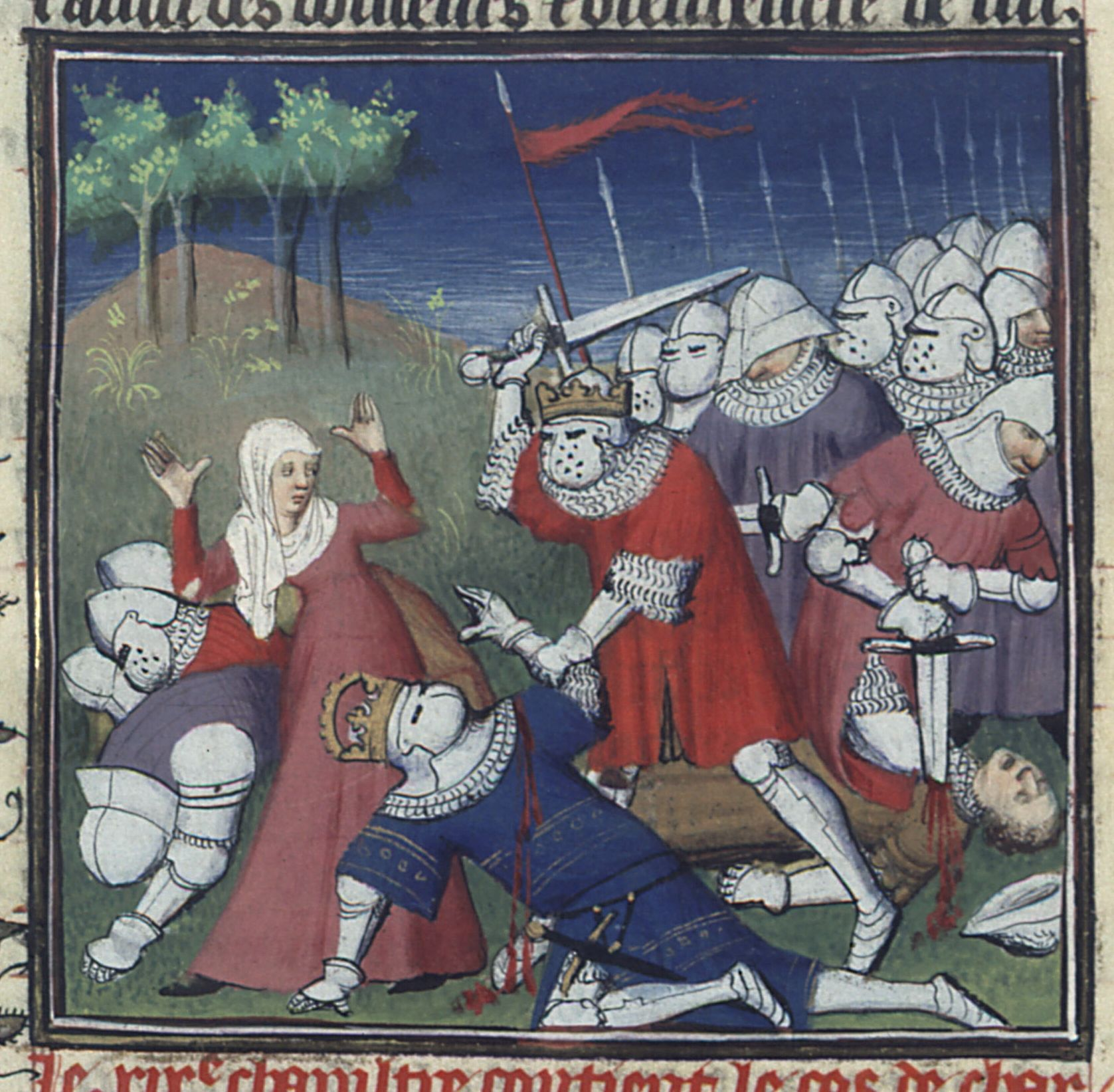 Bataille de Bénévent (1266) et mort de roi Manfred Giovanni Boccaccio, De casibus, XV° siècle, BNF, Fr.226, folio 262 verso.